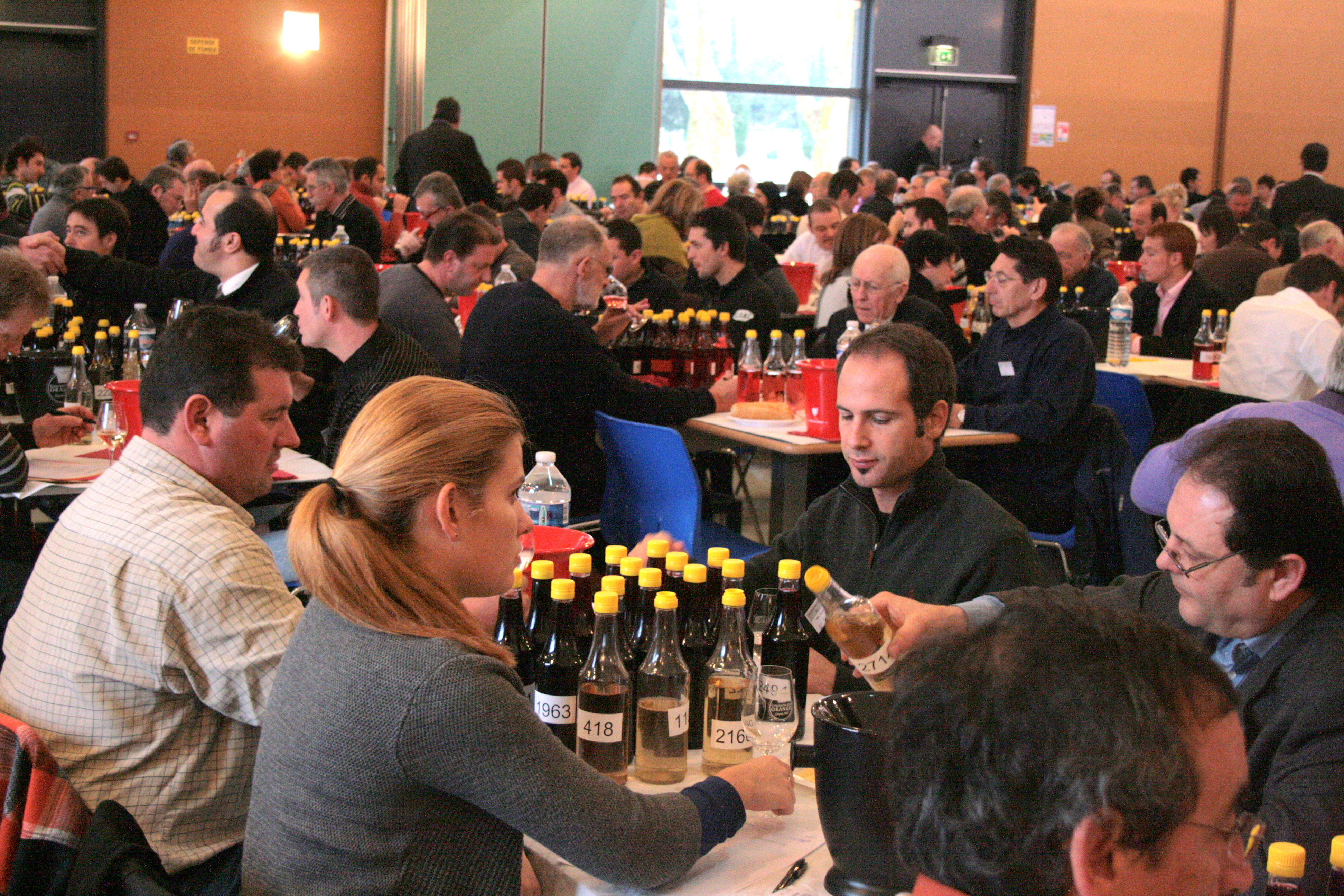 Les jurés en dégustation